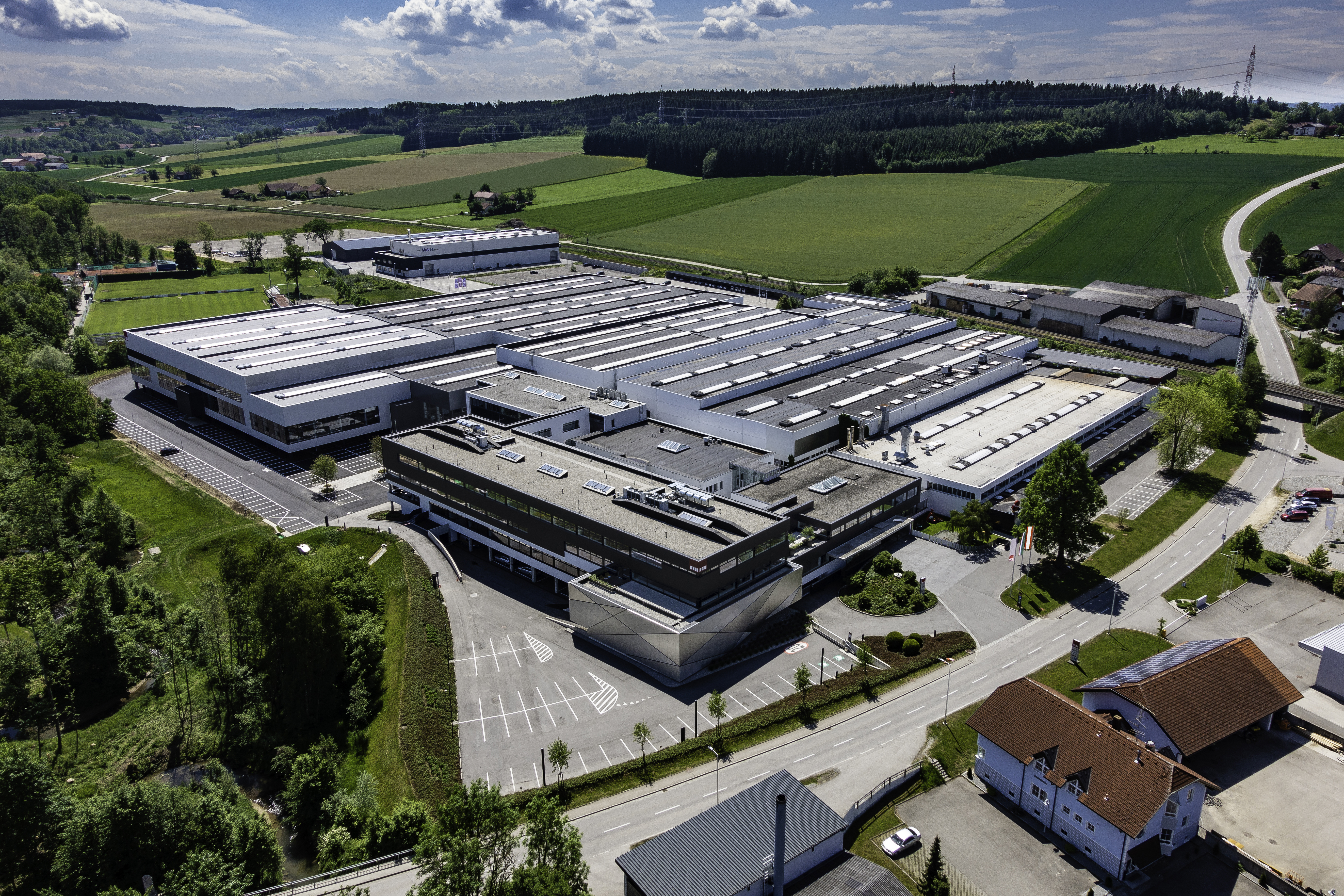 Fill 2019, 860 Mitarbeiter